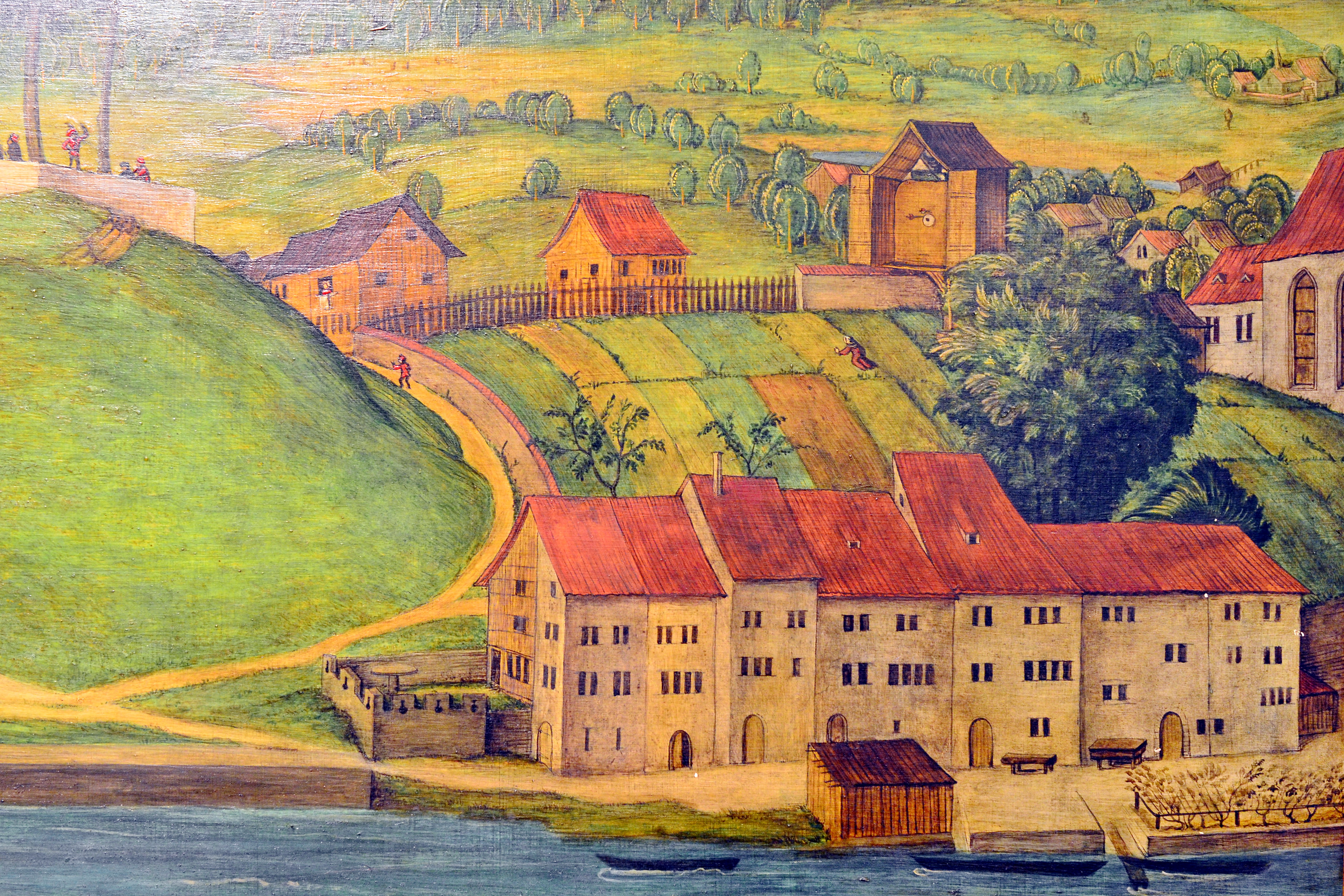 Der Sihlbühl (Lindenhof) und die Schipfe auf der Replik der Altartafeln von Hans Leu im Baugeschichtlichen Archiv der Stadt Zürich im Haus zum Rech. Die Panoramansicht des linksseitigen Limmatufers – 'Standort' der BetrachterIn ist wohl der Karlsturm des Grossmünsters – von Hans Leu d. Ä. gilt als die älteste zuverlässige Darstellung der Stadt Zürich, Ende des 15. Jahrhunderts auf den Altartafeln im Grossmünster mit viel Liebe zum Detail festgehalten. Die originalen Tafeln sind heute im Landesmuseum ausgestellt, eine (vermutlich) 1:1 Replik ist im Stadtarchiv öffentlich zugänglich.